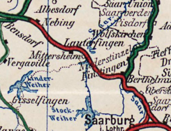 Détail de la carte des chemins de fer d'Alsace-Lorraine en 1906 avec l'emplacement de la halte de Mittersheim.